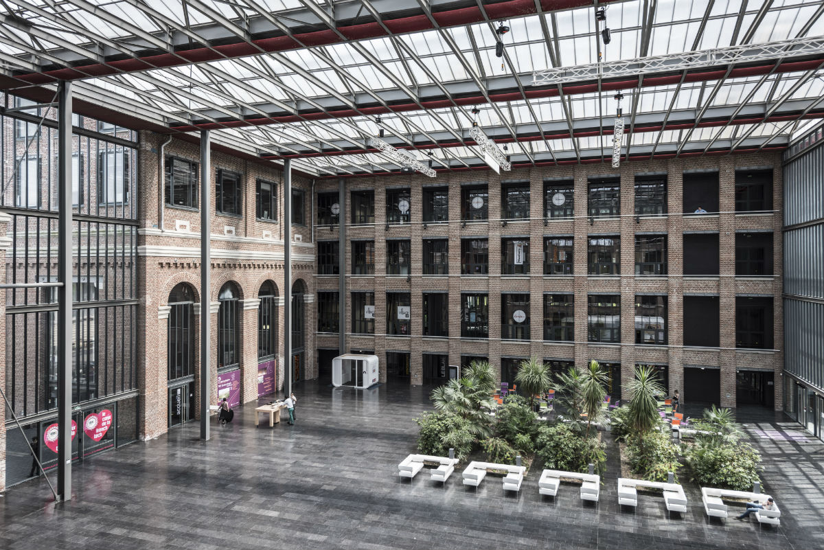 L'atrium d'EuraTechnologies à Lille